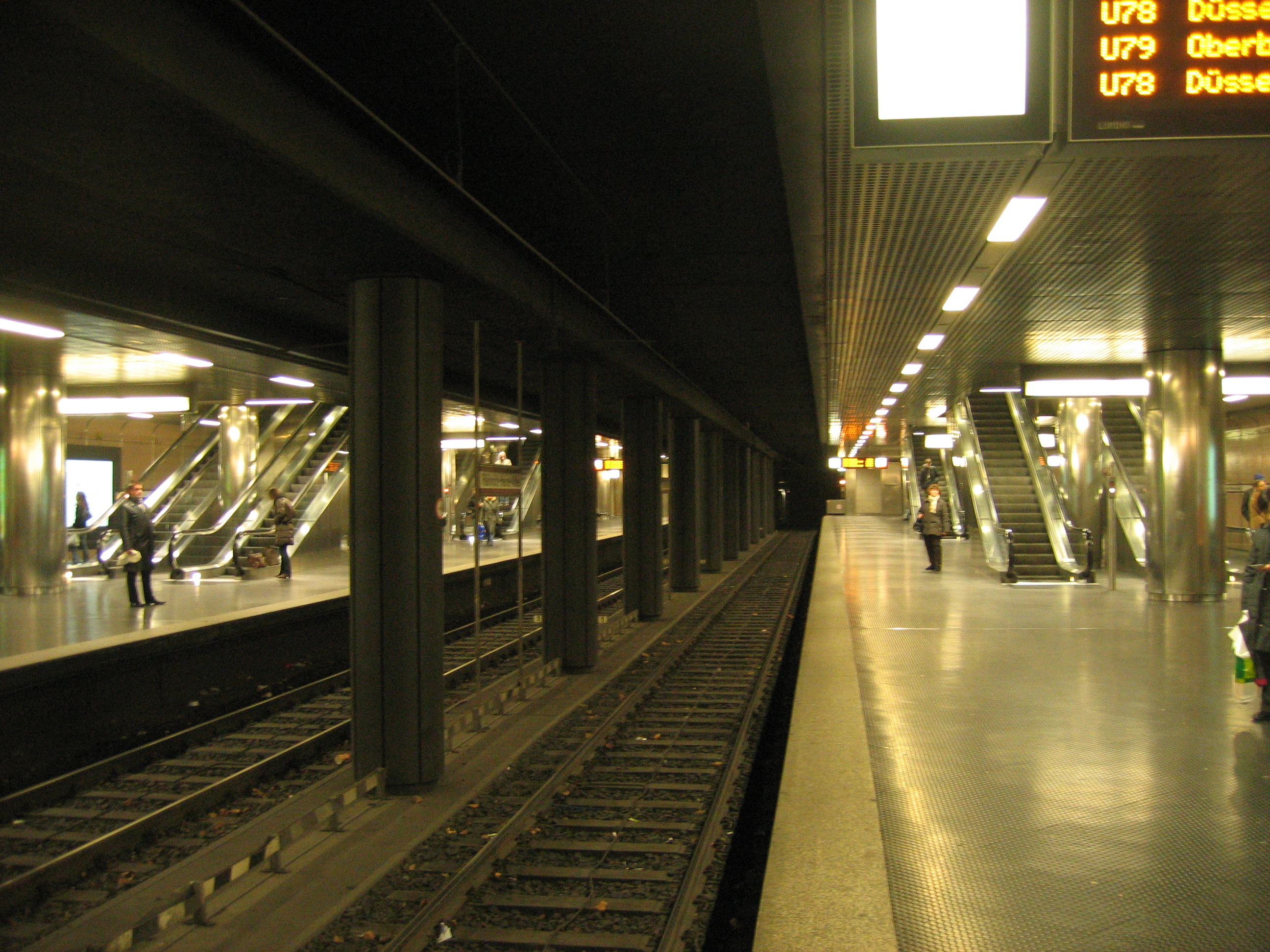 Stadtbahn Düsseldorf, U-Bahnhof Heinrich-Heine-Allee